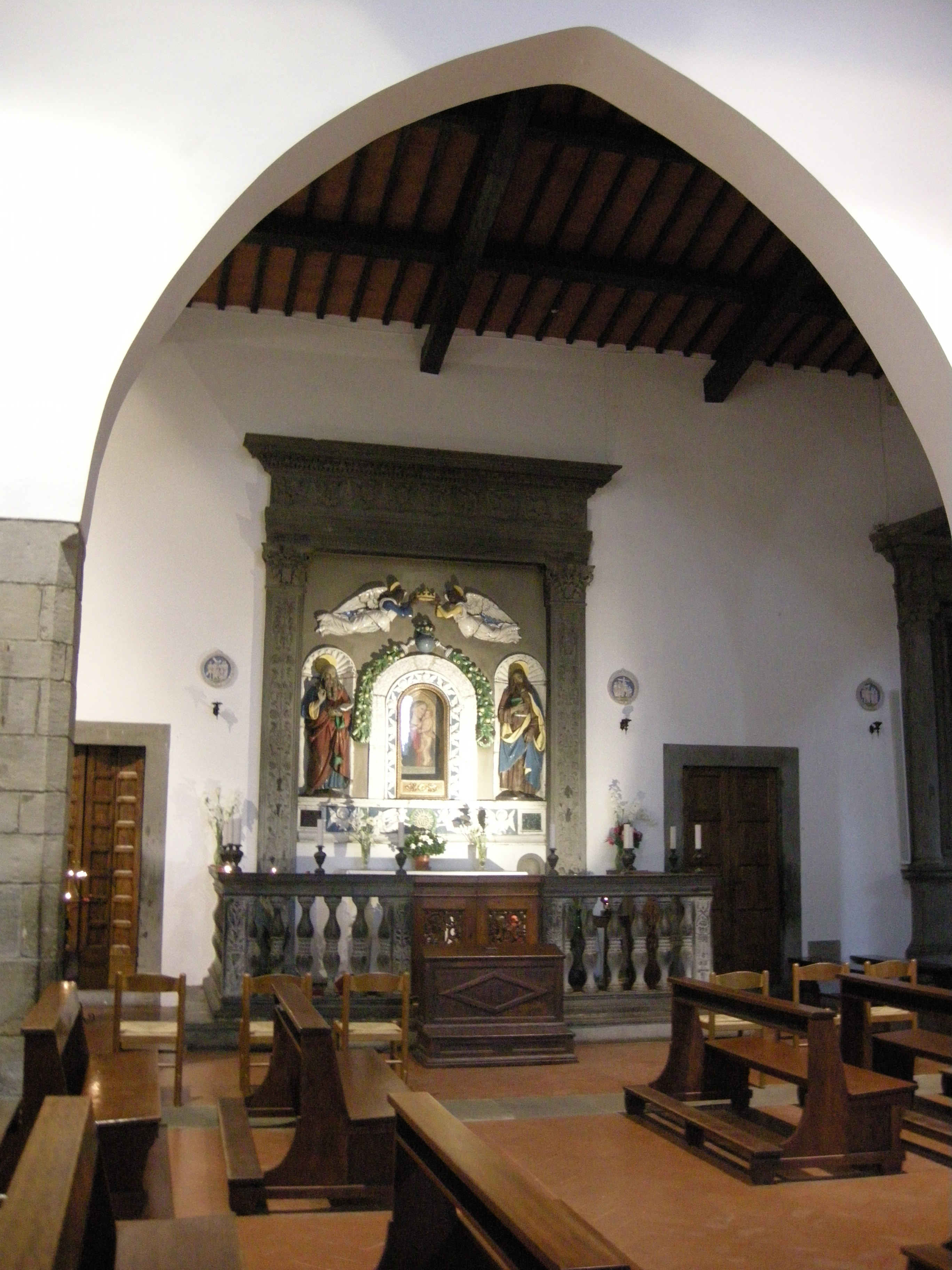 Santo stefano in pane, interno